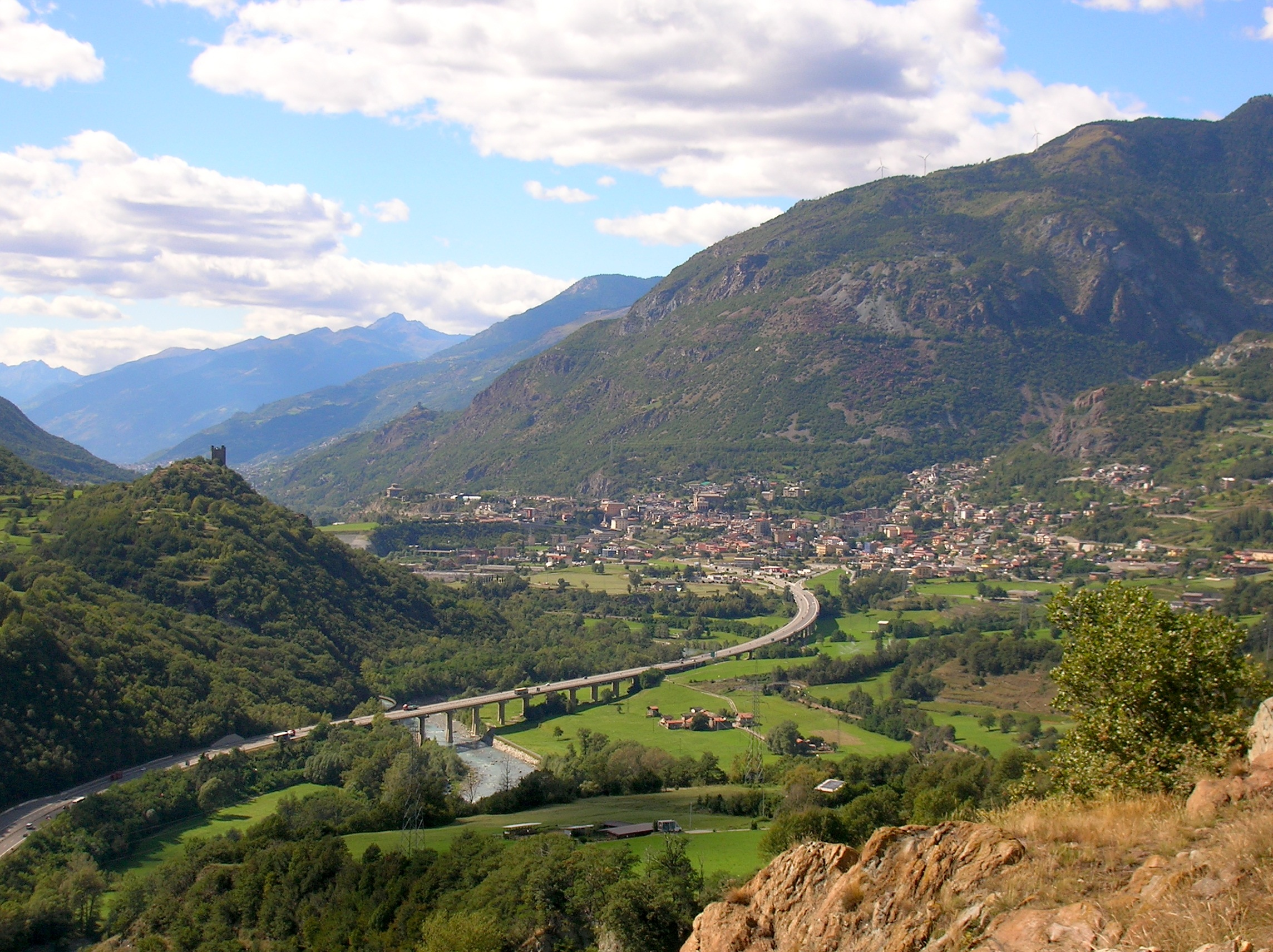 panorama di Châtillon, vista dal geosito Tsalleun. Châtillon, Valle d'Aosta, Italia.